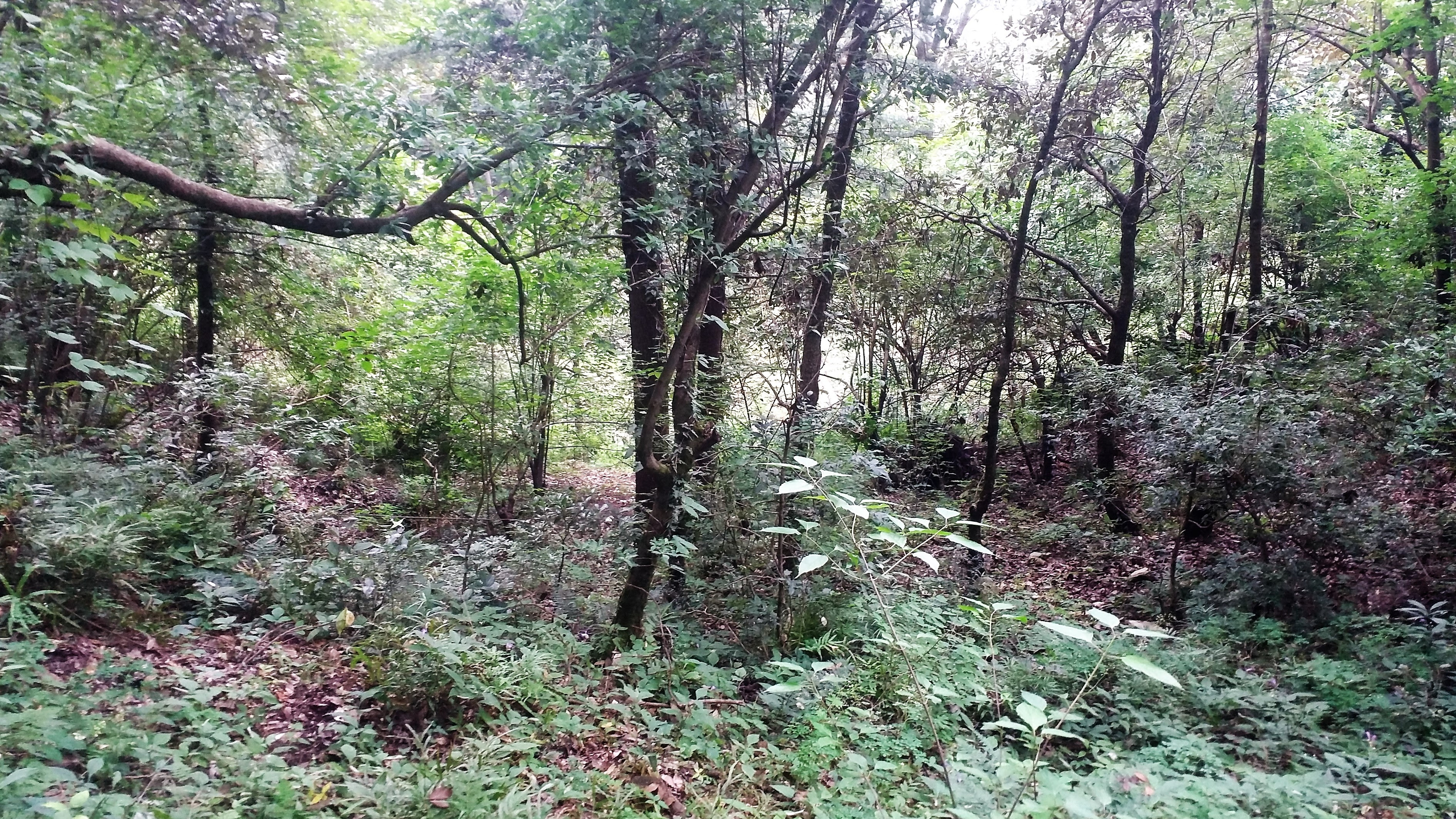 Nainital, Uttarakhand, India